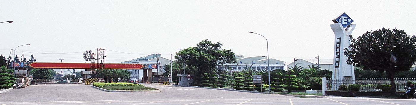 唐榮科技園區，位於新竹縣湖口鄉新興路458號，大門右側為臺灣車輛廠房。